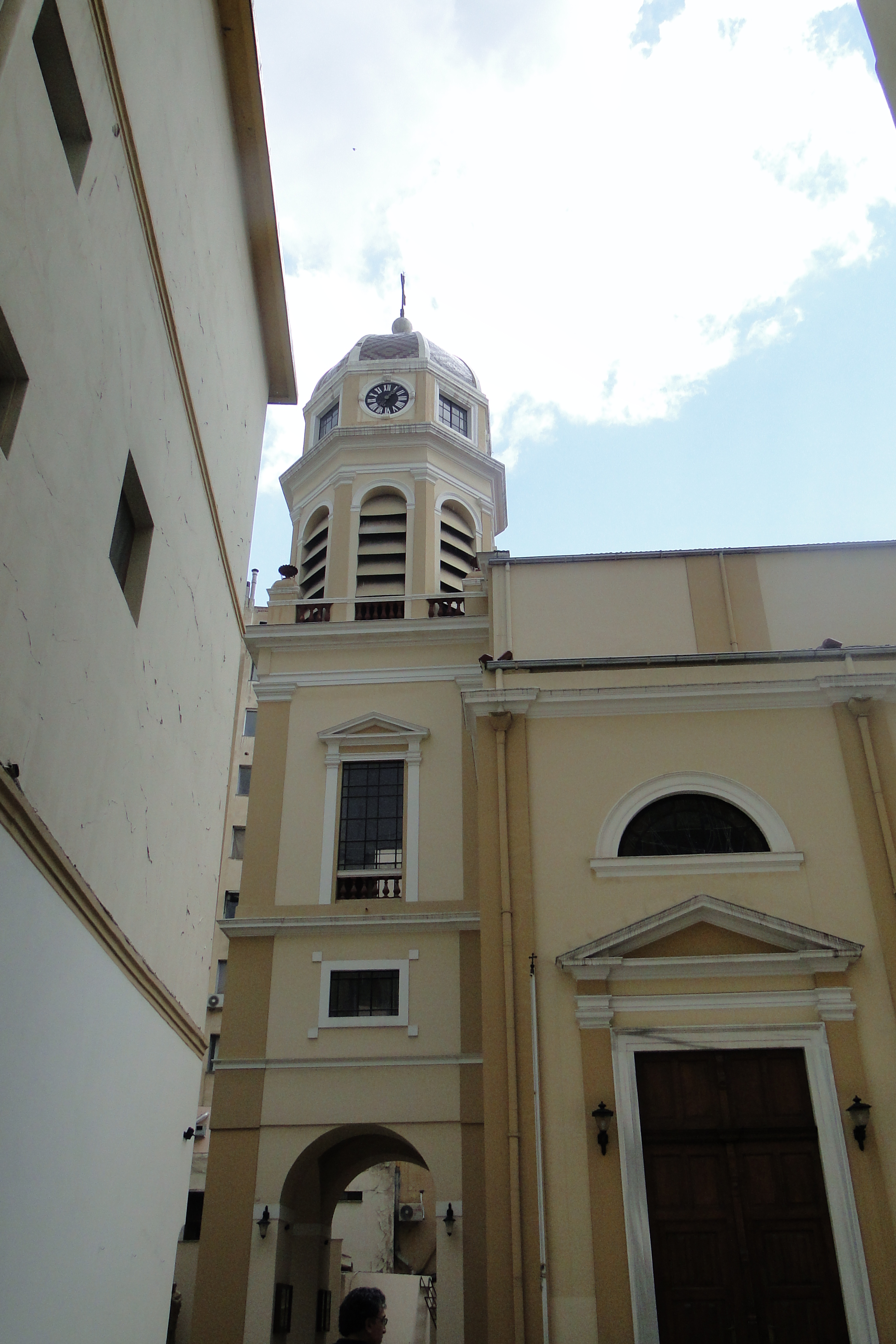 Ecclesia Catholica Immaculatae Conceptionis Thessalonicae.